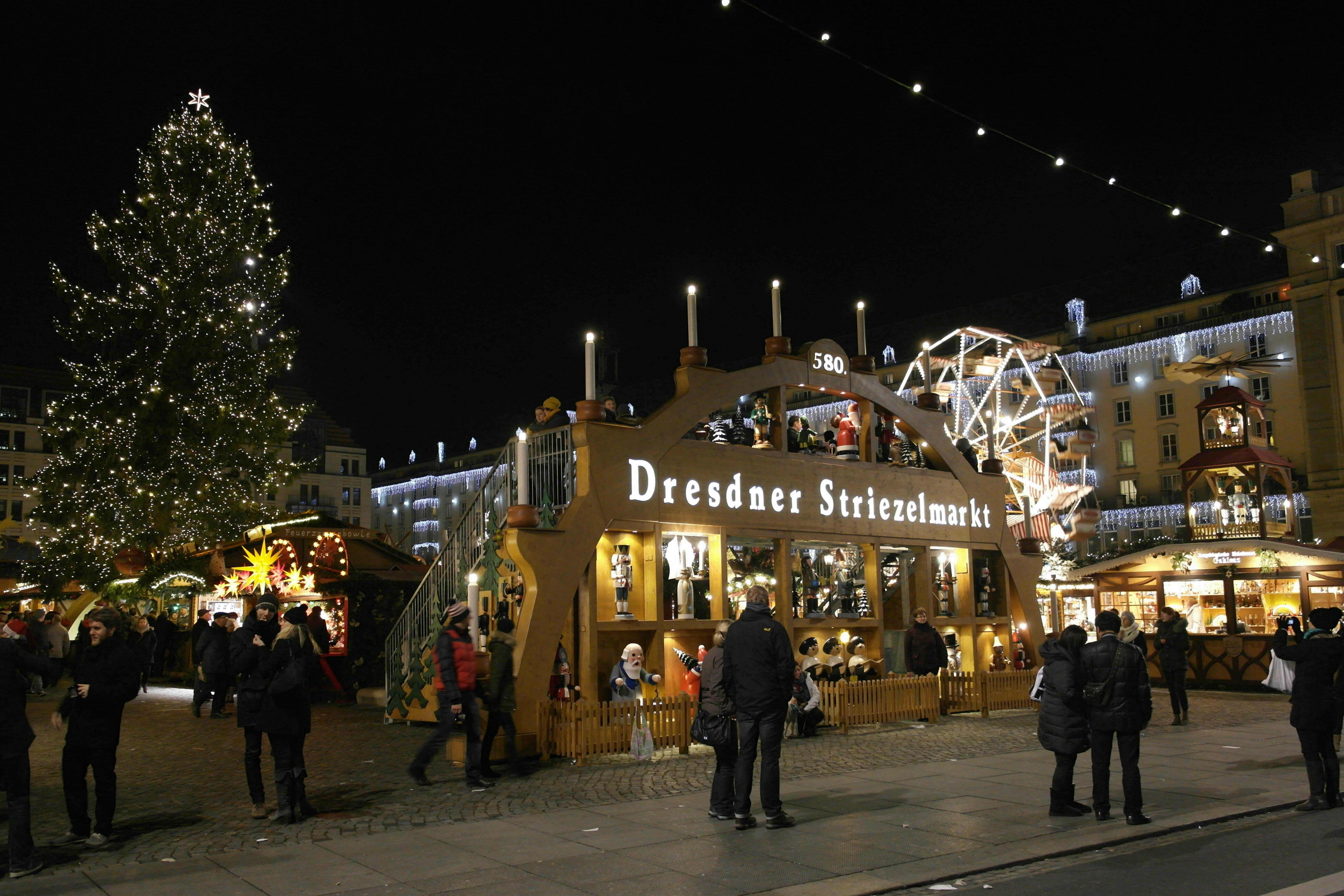 580. Striezelmarkt - 2014